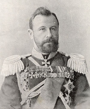 Генерал Алексей Николаевич Куропаткин